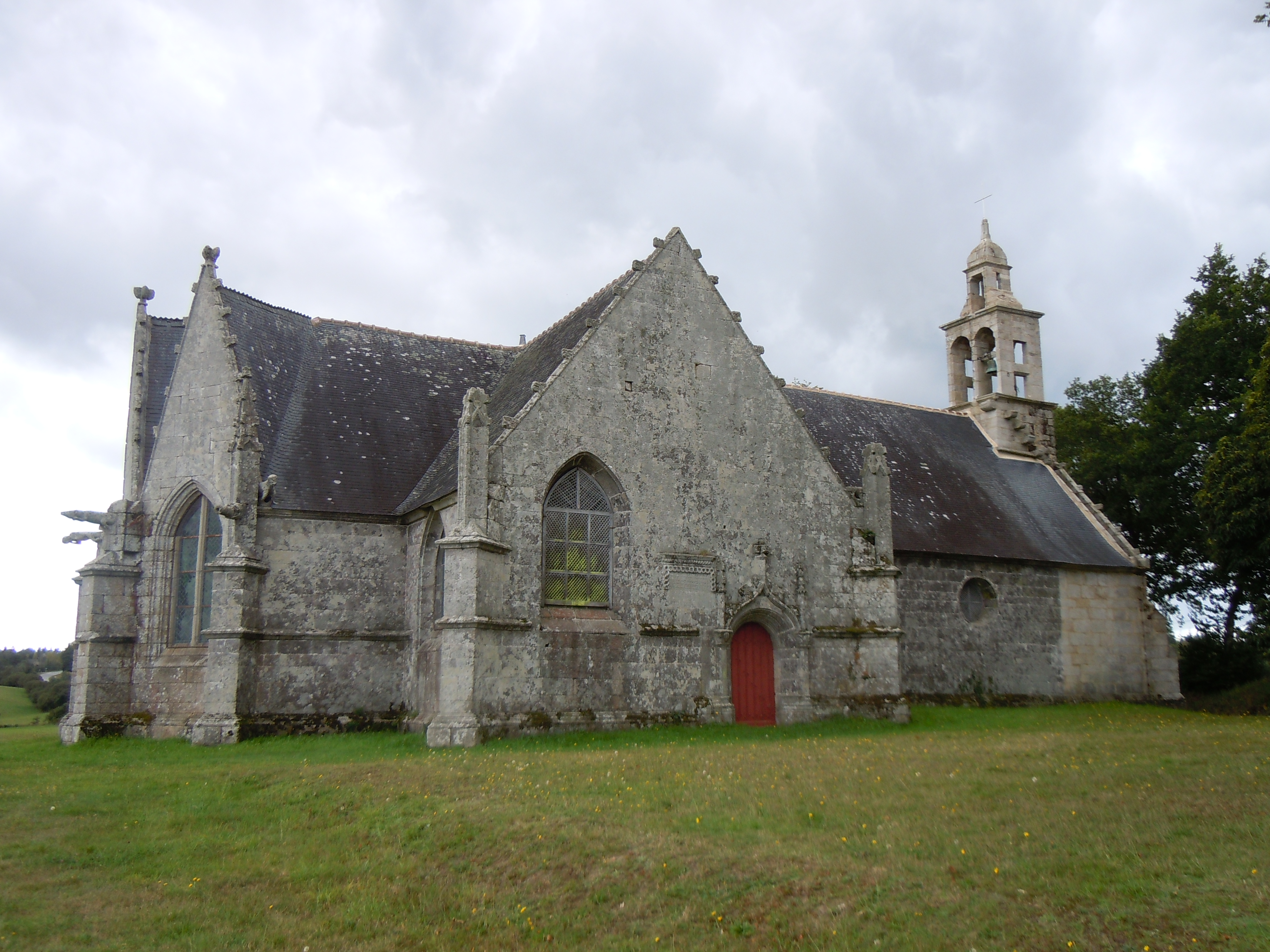 chapelle Saint-Sébastien, commune du Faouët, département du Morbihan, France